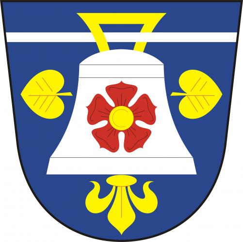 znak, Babice , okres Prachatice